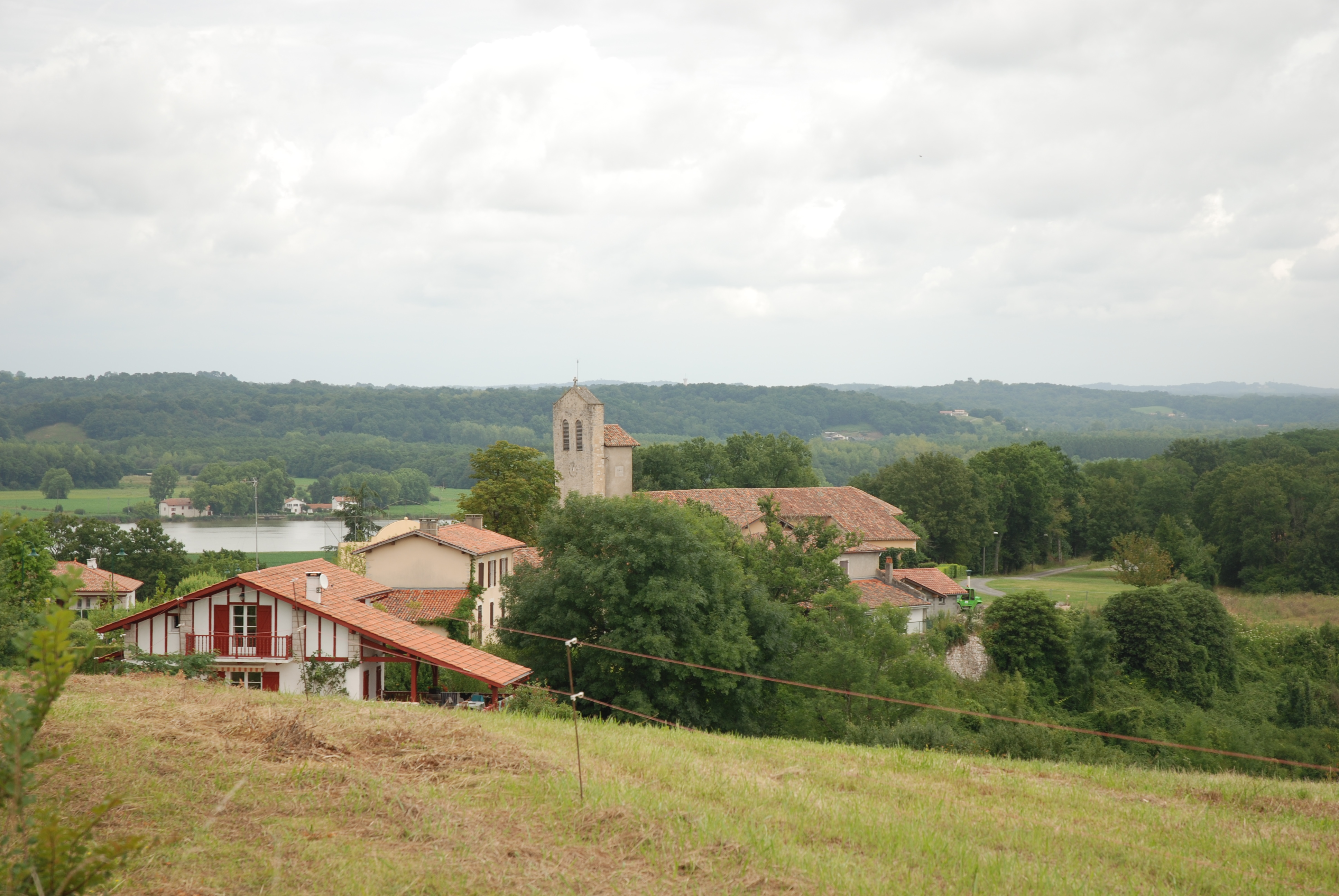 Lahonce, l'abbaye de chanoines de Prémontré, actuellement église paroissiale de l'Assomption-de-la-Bienheureuse-Vierge-Marie et mairie, se détachant sur l'Adour.